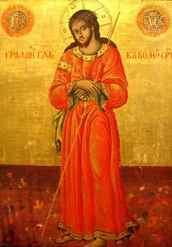 Оди Христос кон болно страдање, средина на 19 век, автор зограф Никола Михајлов, црква „Св.Никола“ - Куманово